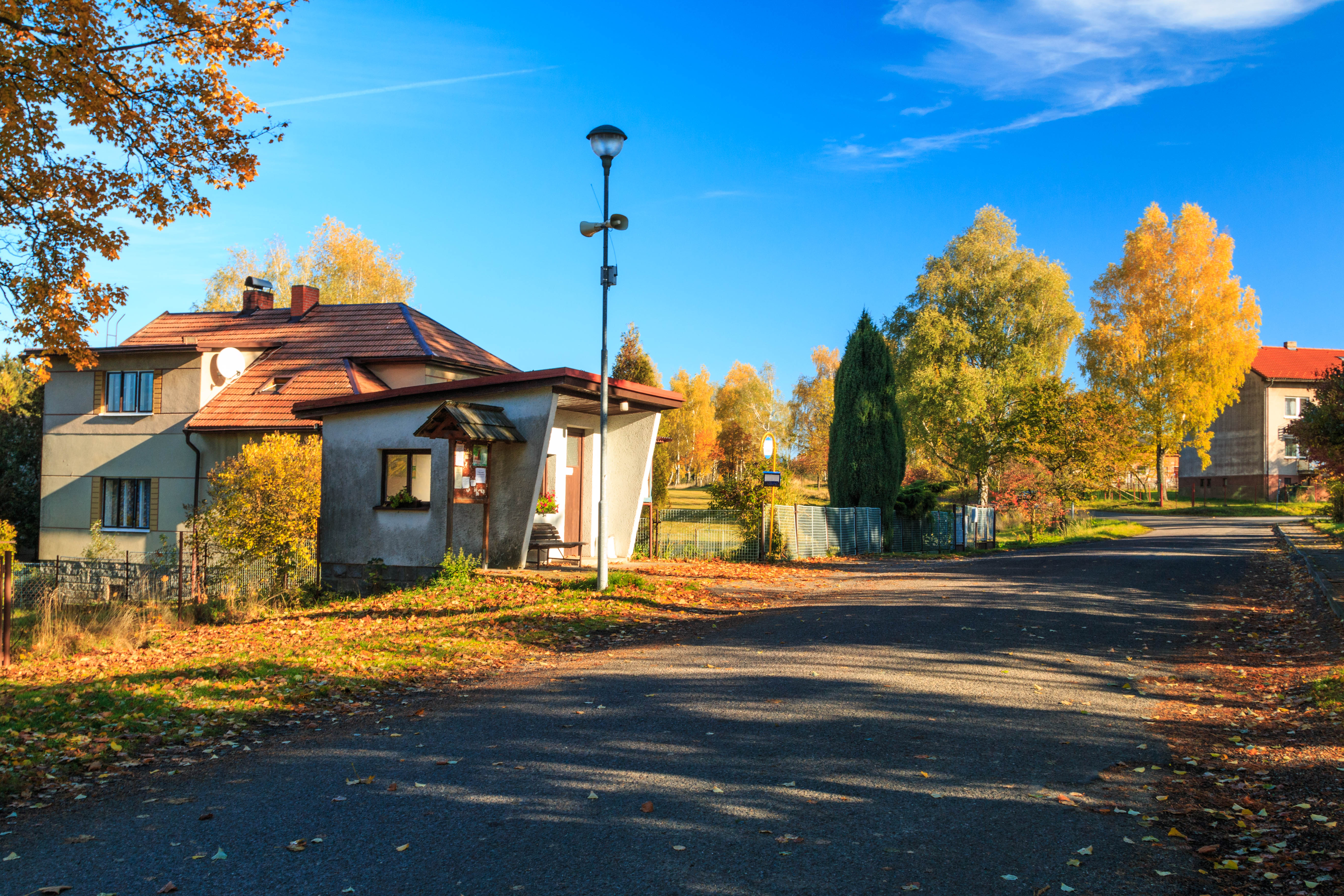 Barovice zastávka